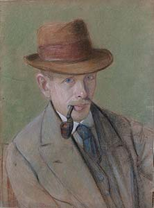 Модест Сосенко. «Автопортрет» (1915)